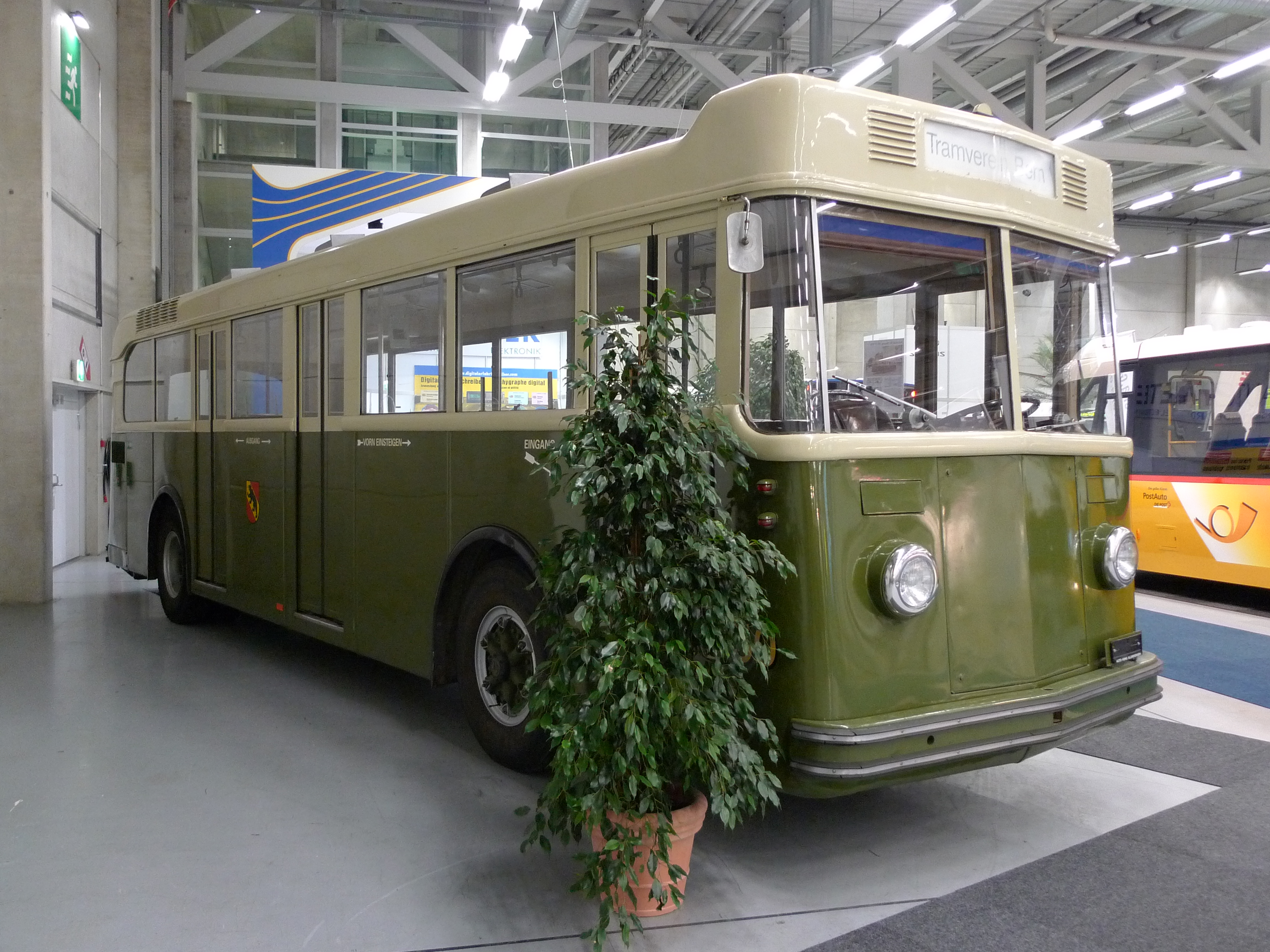 Saurer Autobus 4H CT1D, Baujahr 1941, Motor CT1D, Sitzplätze 32/30, Stehplätze 28. Karrosserie: Gangloff AG Bern